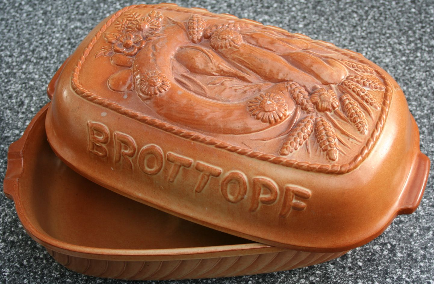 Brottopf